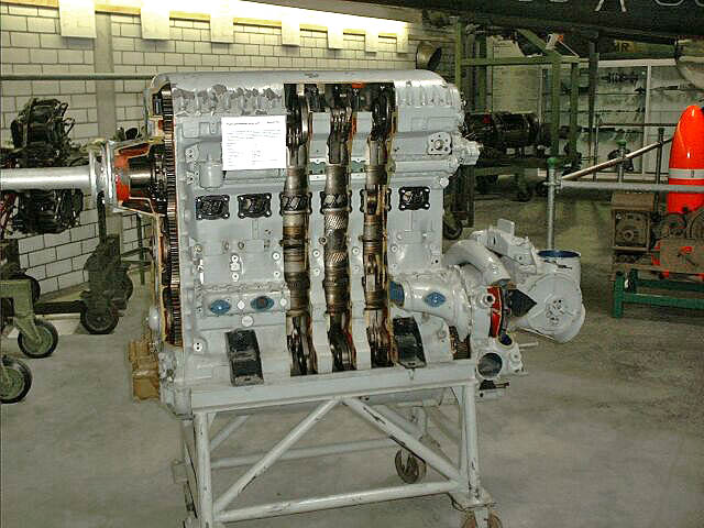 Junkers Jumo 205D Gegenkolbendieselmotor